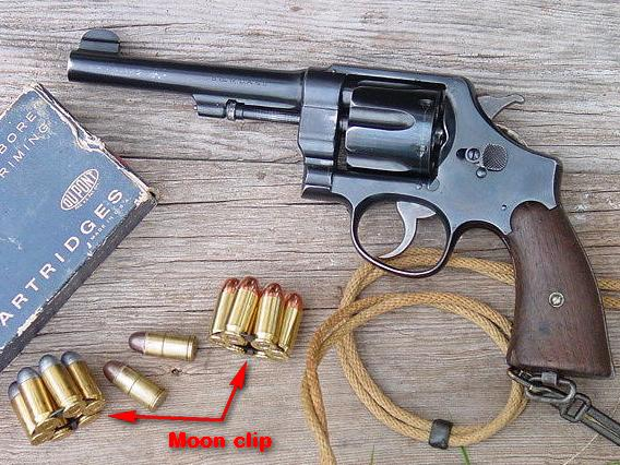 Ilustrasi Moon Clip pada peluru Revolver